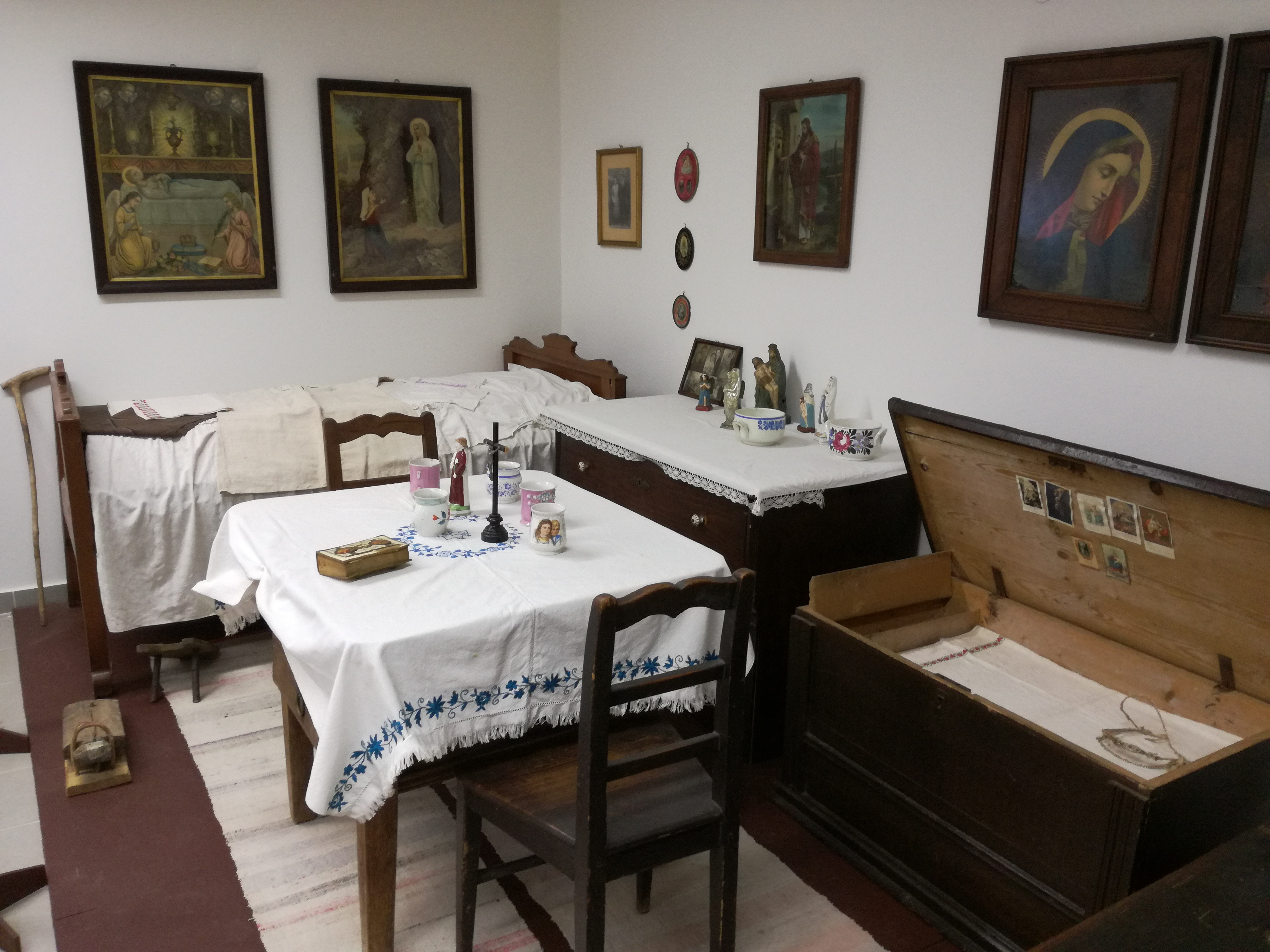 Lengyel Múzeum, Derenki emlékház – az andrástanyai gyűjtemény